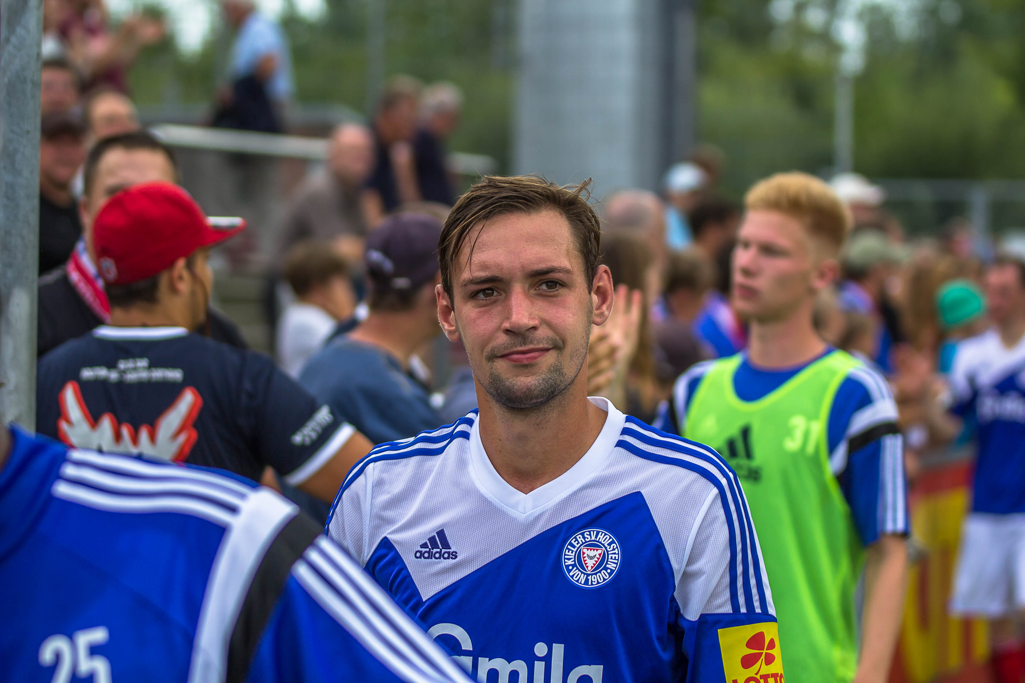 Maik Kegel (Holstein Kiel)